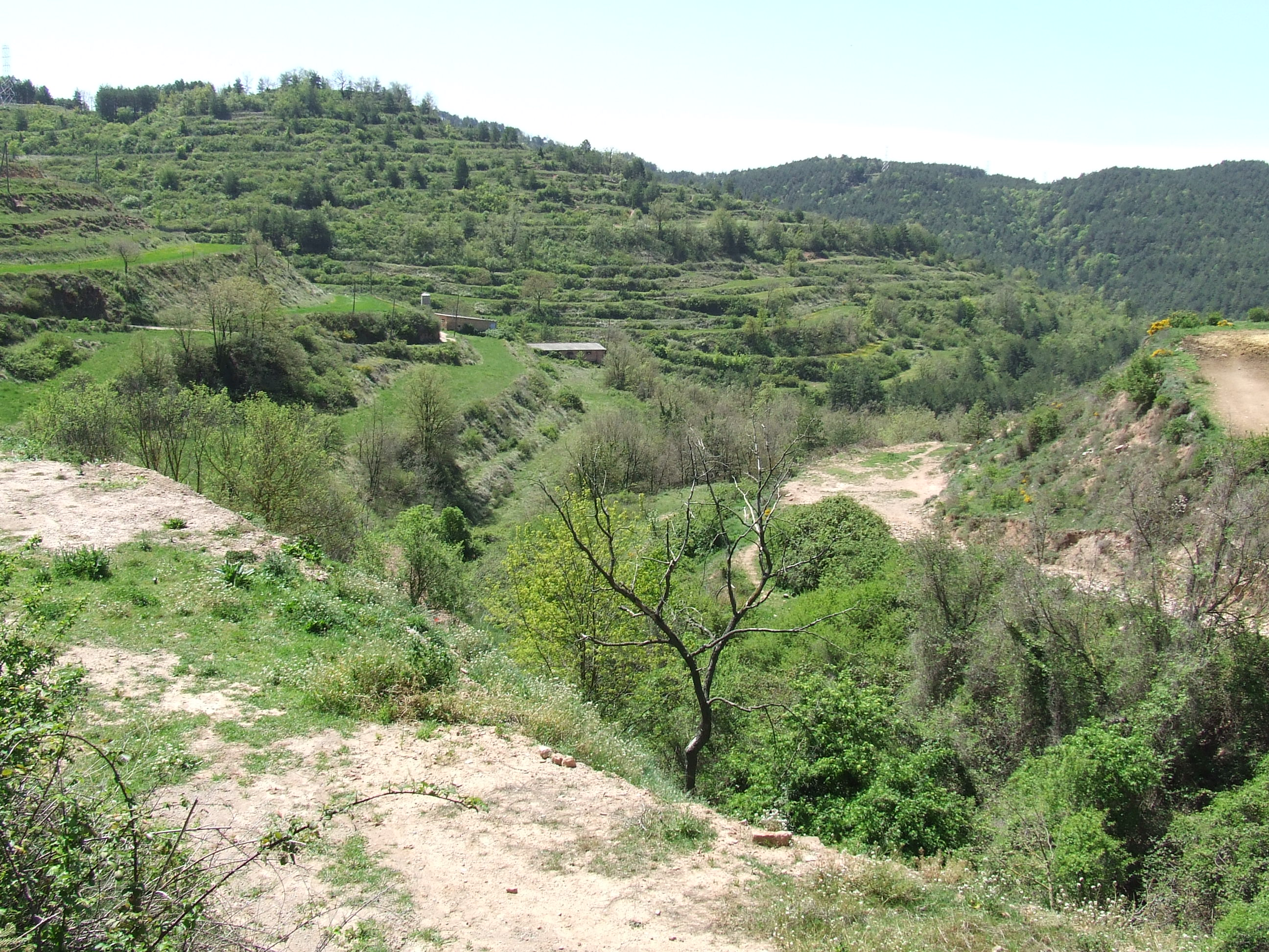 El Torrent de Giraculs (l'Estany, Moianès)